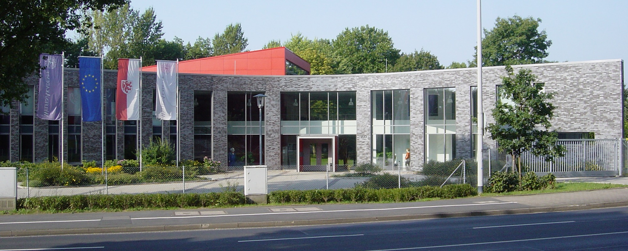 Welfenakademie Braunschweig, Berufsakademie, Salzdahlumer Straße 160, 38126 Braunschweig